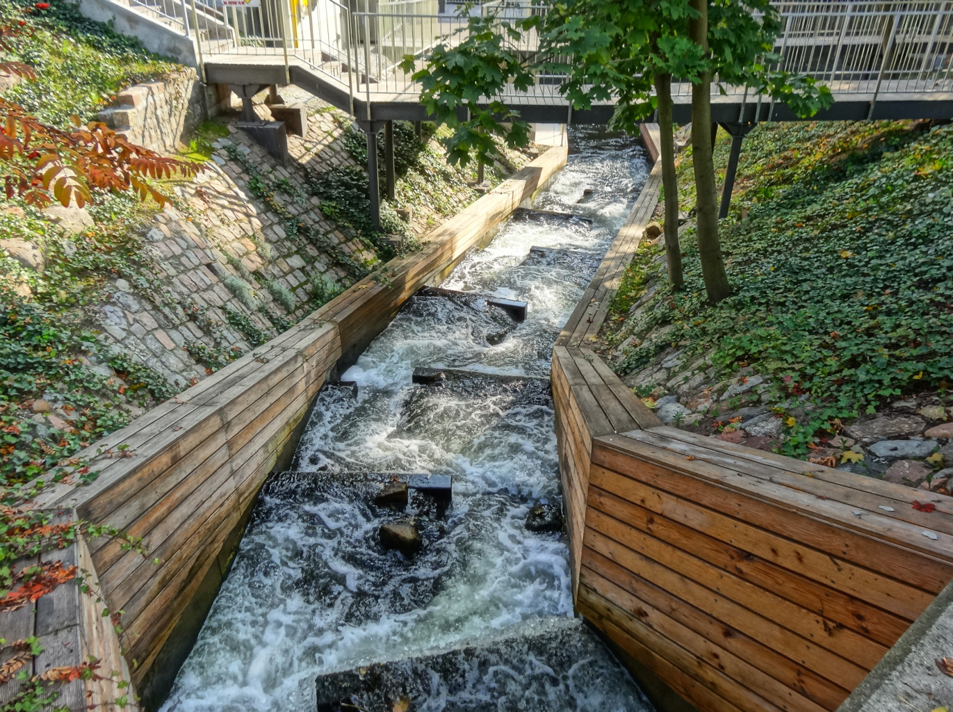 Przepławka dla ryb na Wyspie Młyńskiej w Bydgoszczy w pobliżu jazu Ulgowego